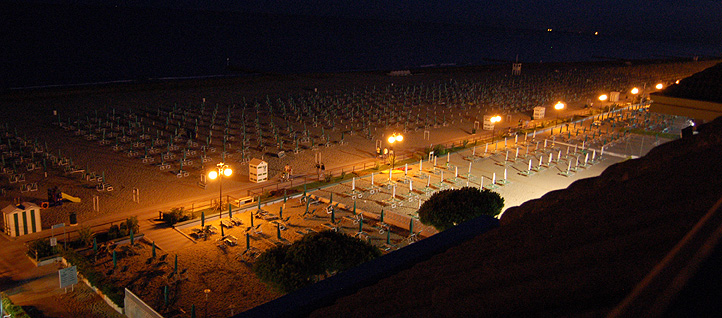 Jesolo, Veneto, Italia